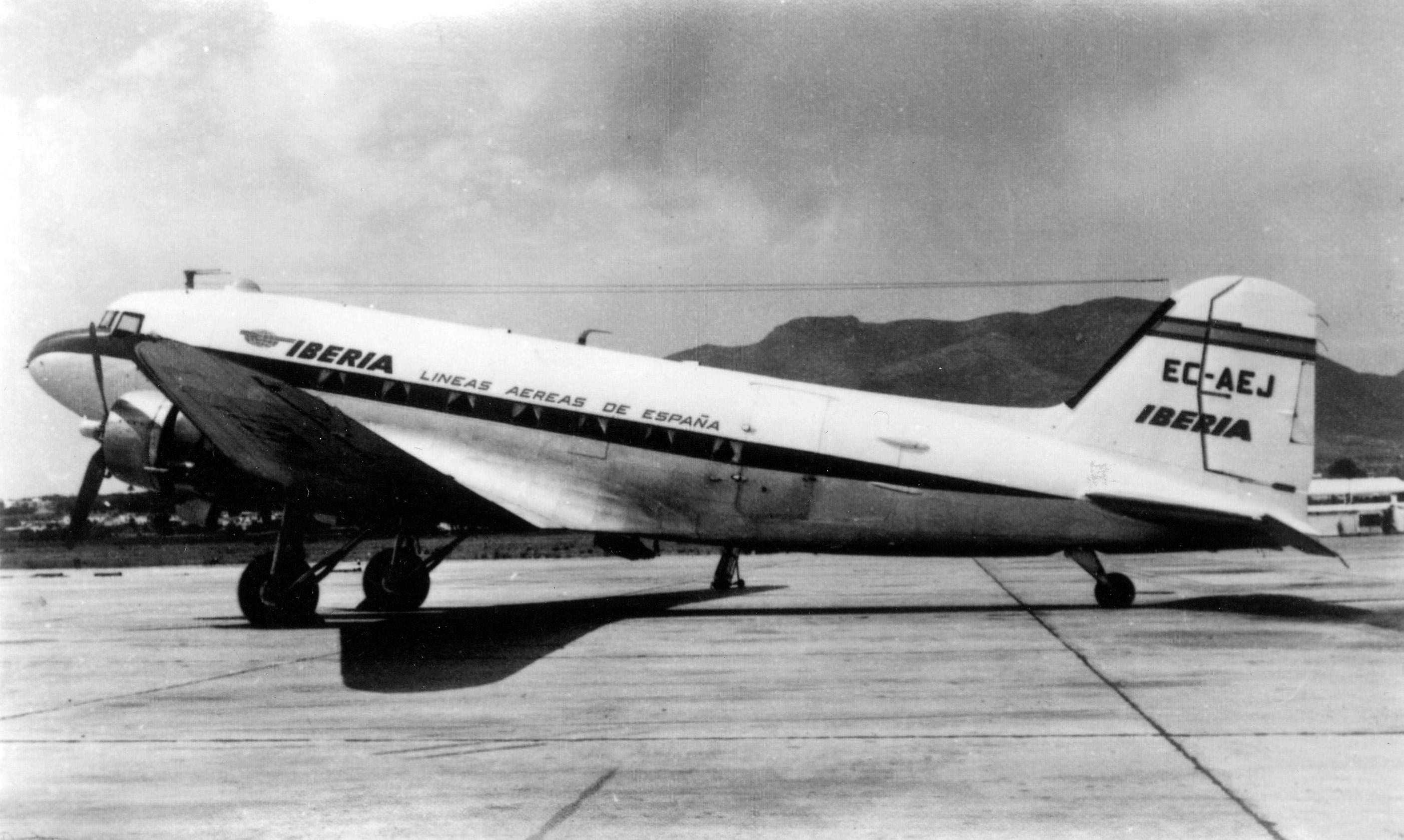 EC-AEJ